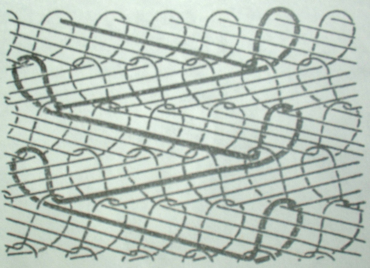 Schema der Maschenbindung. Offener Samt